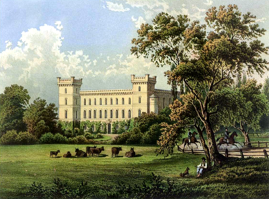 Schloss Stubendorf, Kreis Groß-Strehlitz, Provinz Schlesien